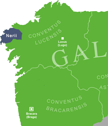 Mapa que amosa situación aproximada da tribo dos nerios ou Nerii, na provincia romana da Gallaecia.